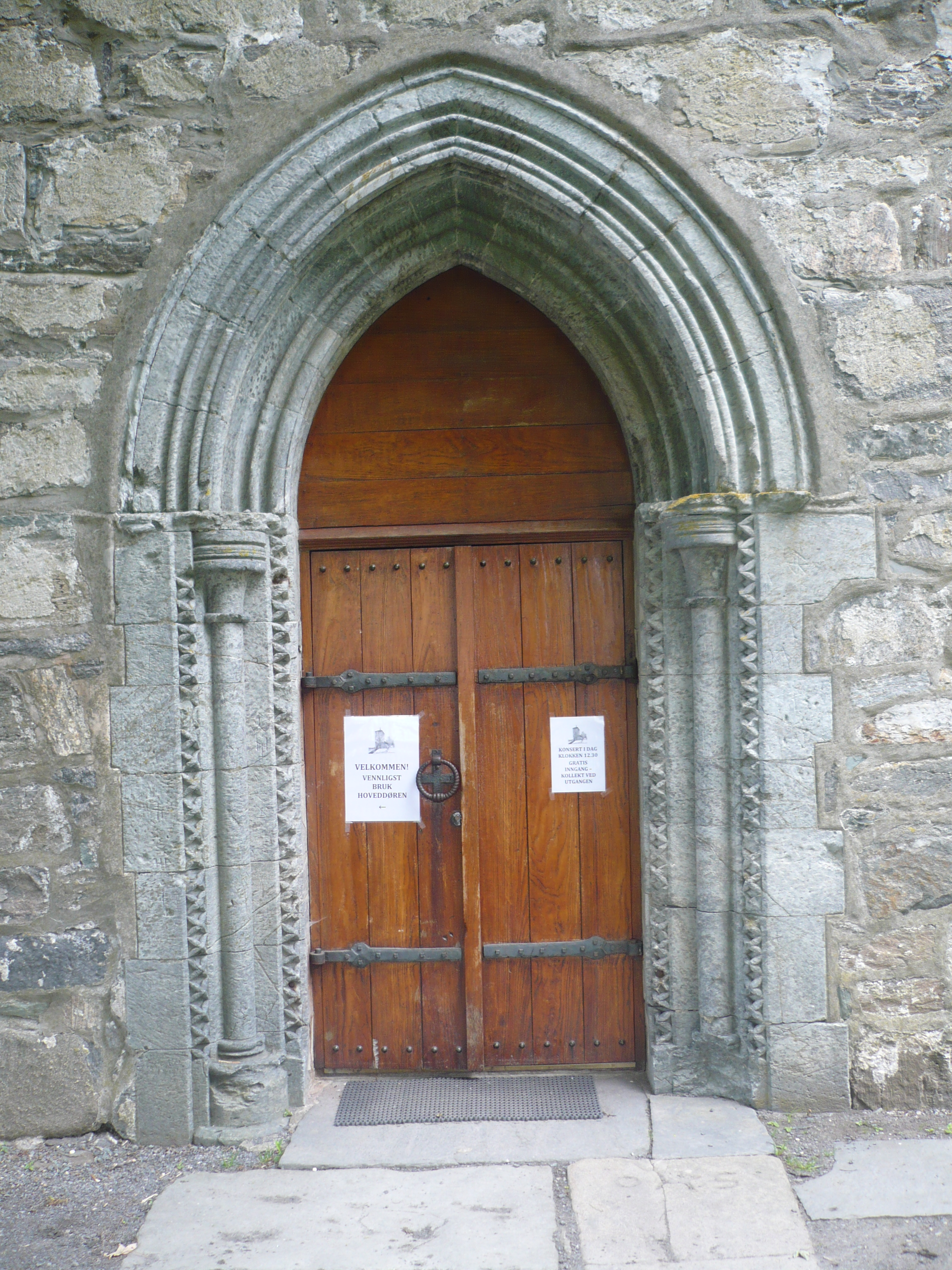 Gotisk sørportal på Avaldsnes kirke.